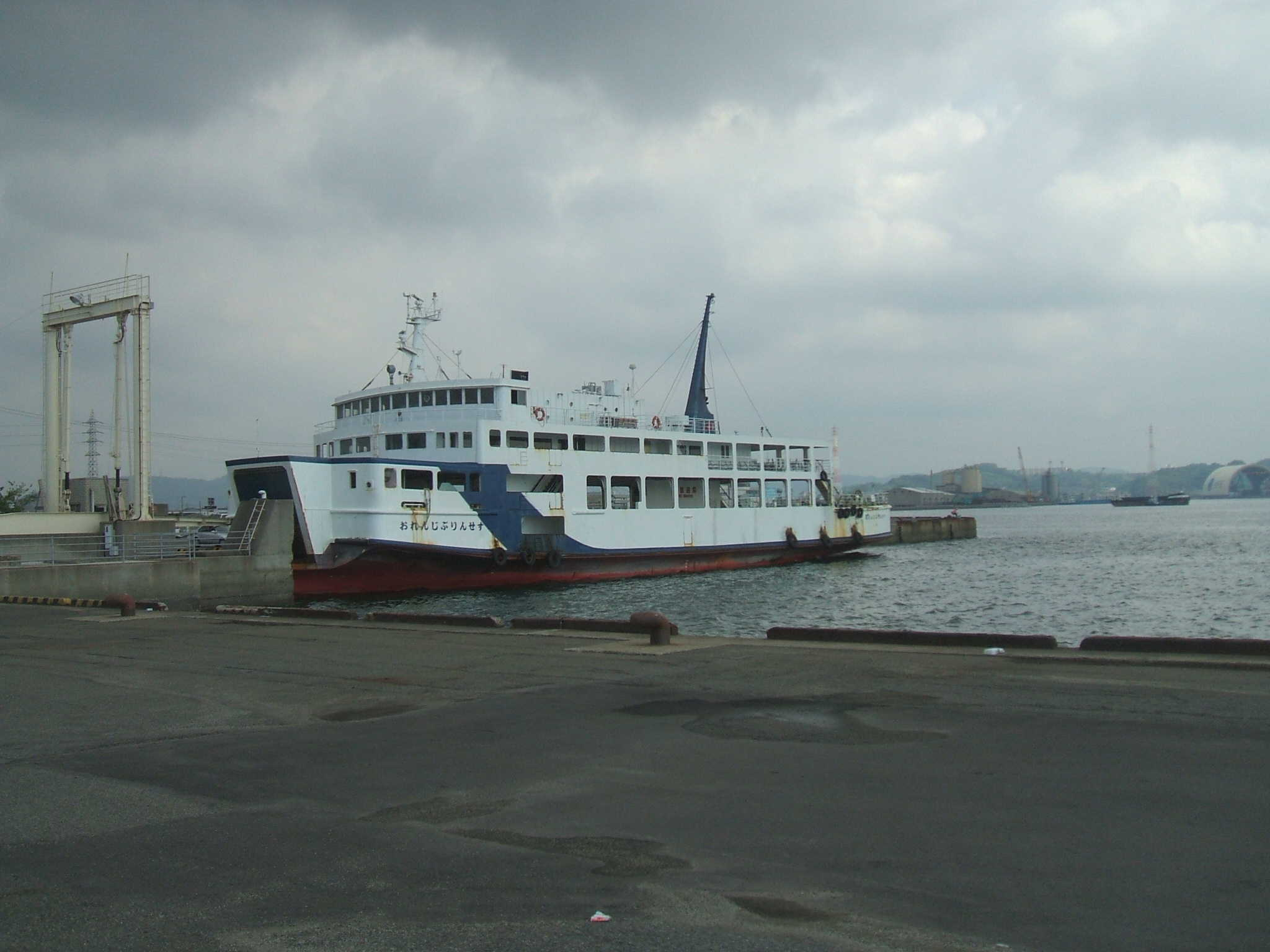 広島県福山市にある福山港に係留された福山多度津フェリーの「オレンジプリンセス」。航路が2008年8月31日に廃止された翌日に撮影。